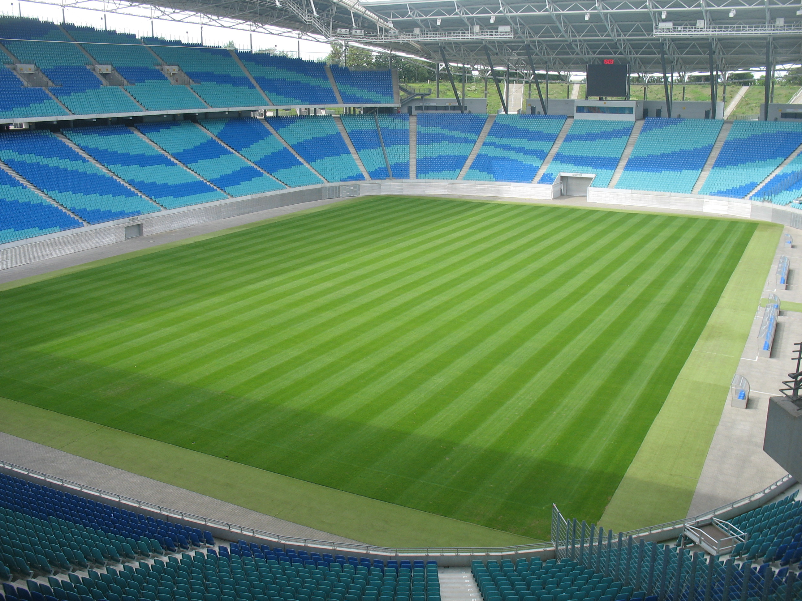 Zentralstadion (heute: Red-Bull-Arena) in Leipzig 2009